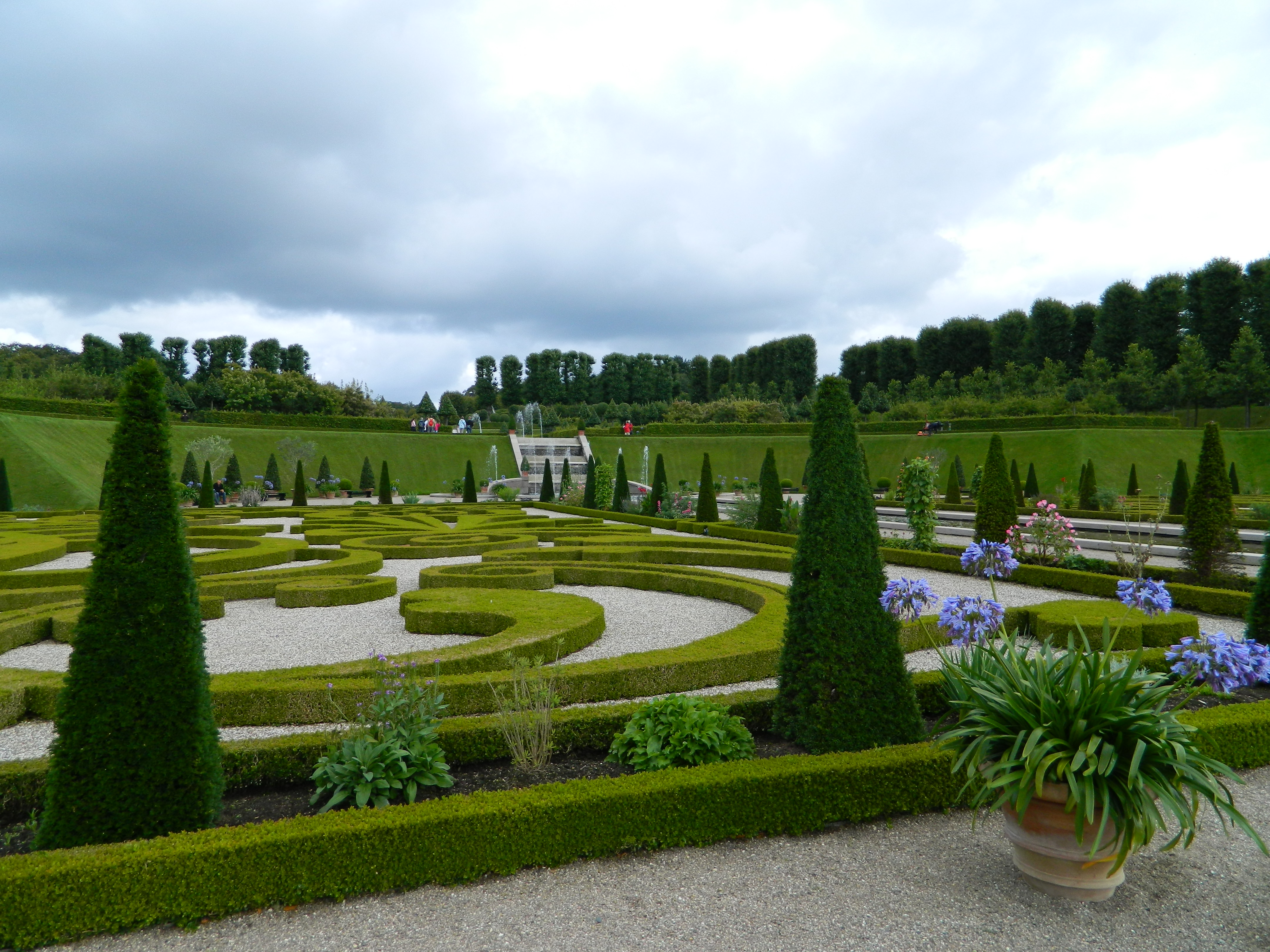 Frederiksborg Palace Gardens